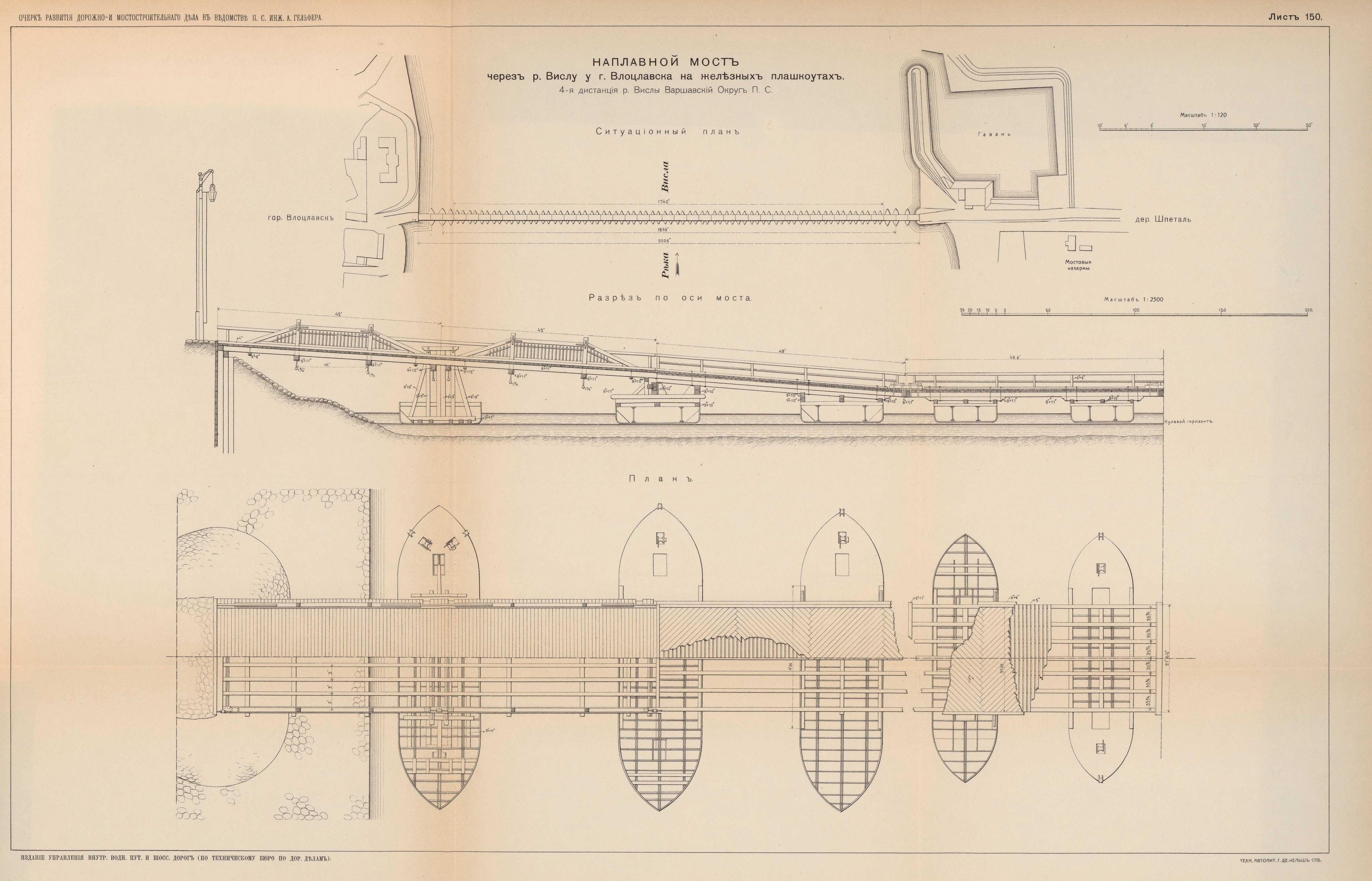 Наплавной мост через Вислу у города Влоцлавек.